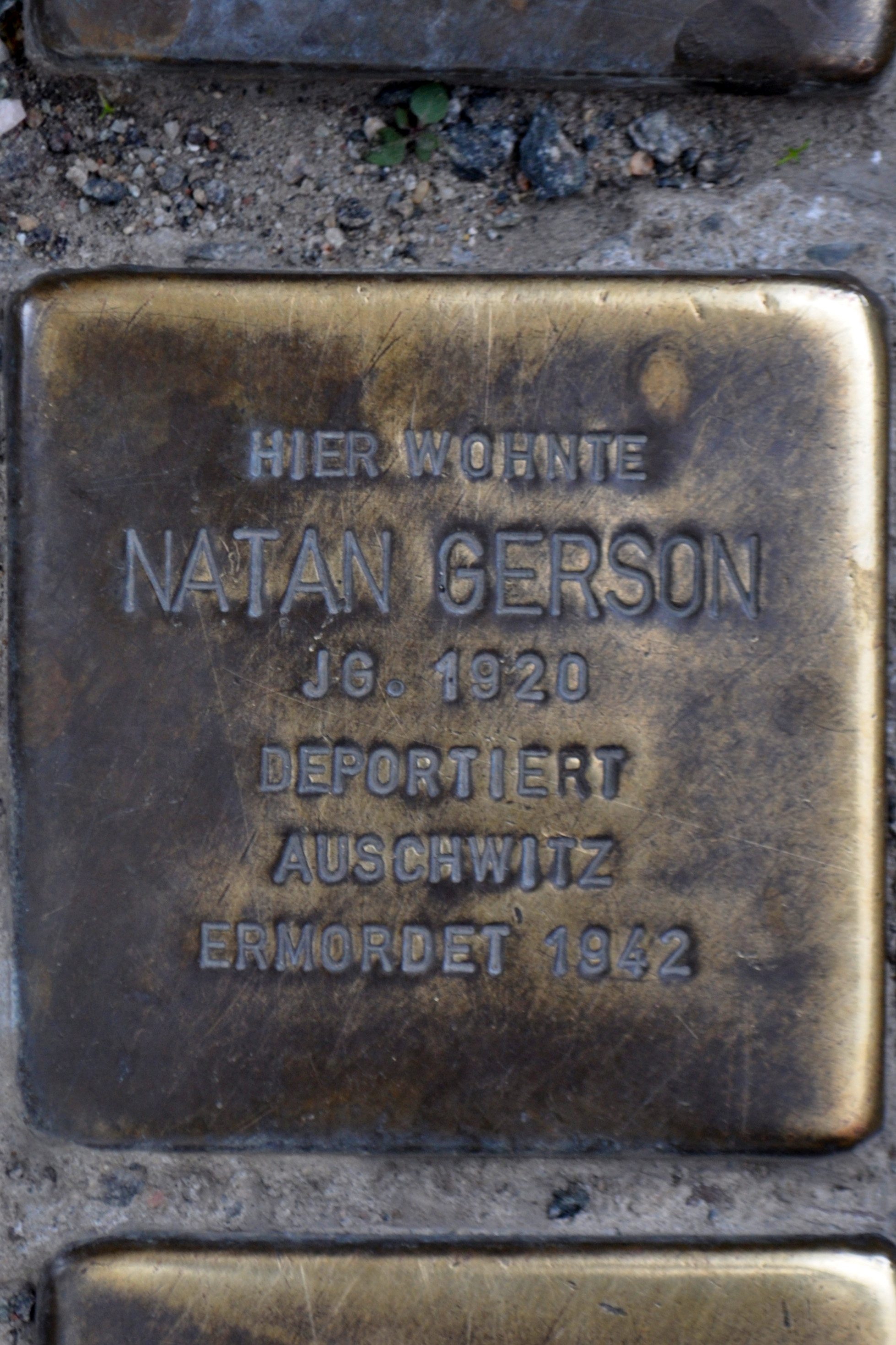 Stolperstein in Stralsund, Tribseer Straße. Der Stein ist einer von drei Stolpersteinen an diesem Ort. Text: Hier wohnte Natan Gerson Jg. 1920 deportiert Auschwitz ermordet 1942